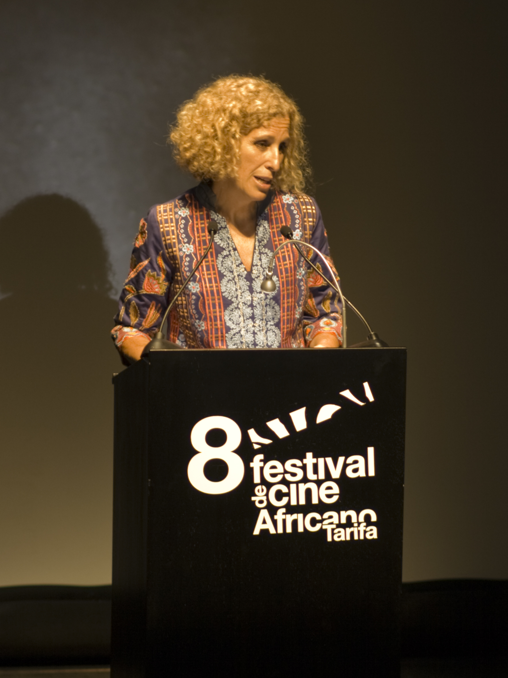 Mane Cisneros, directora del festival en un momento de la gala de inauguración